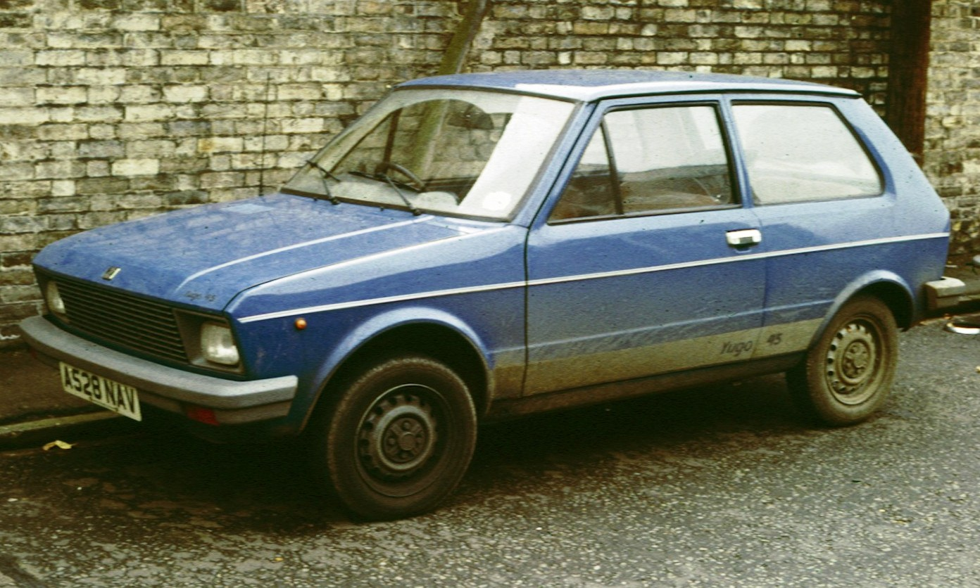 Zastava Yugo 45 Koral in England.